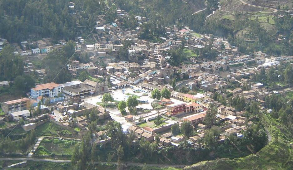 Vista Panoràmica (parcial) del distrito de Yauli - Huancavelica